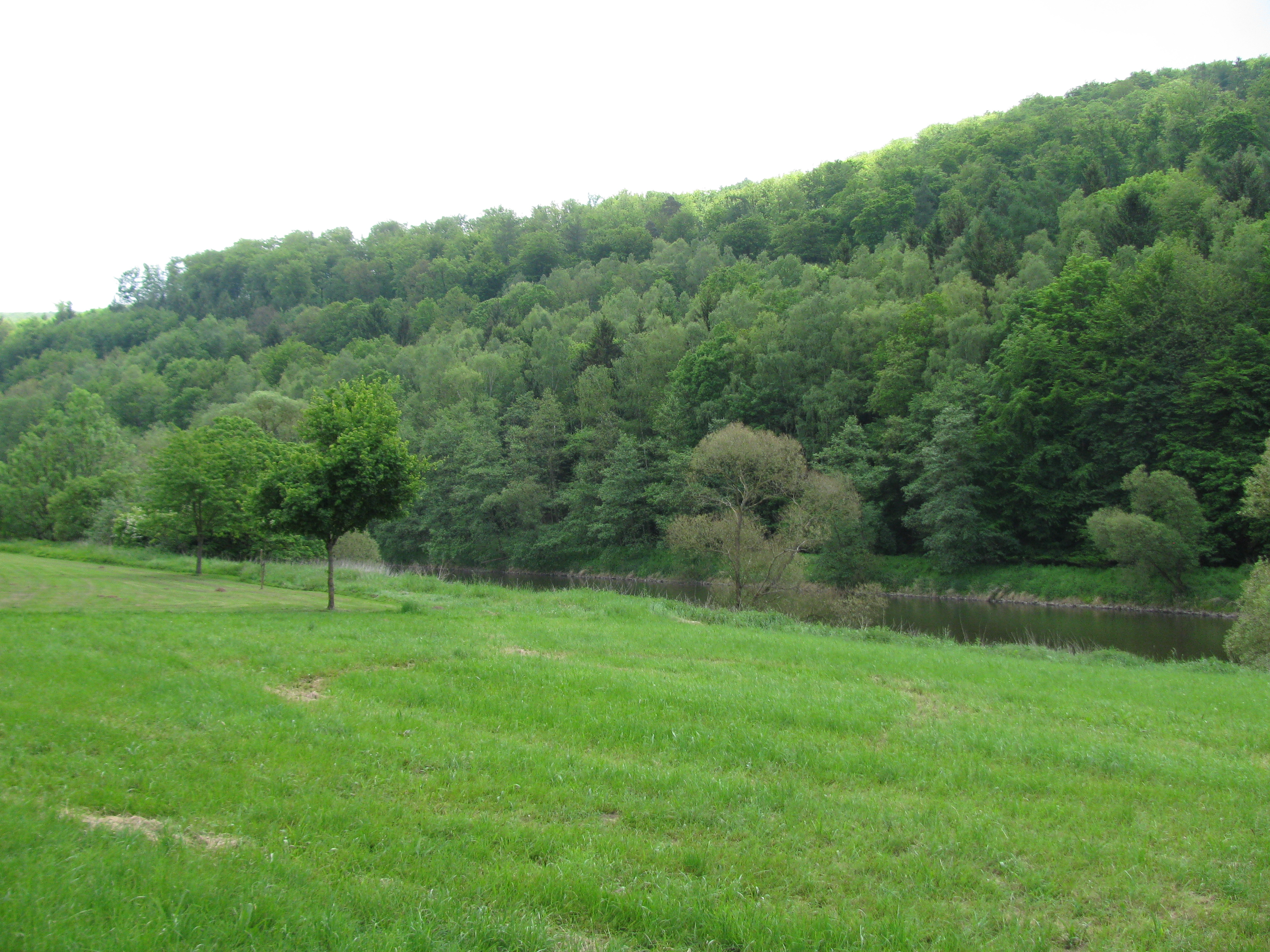 Blick von Wahnhausen auf die Fulda und das niedersächsische Ufer der Fulda, das hier zum FFH-Gebiet Fulda zwischen Wahnhausen und Bonaforth gehört